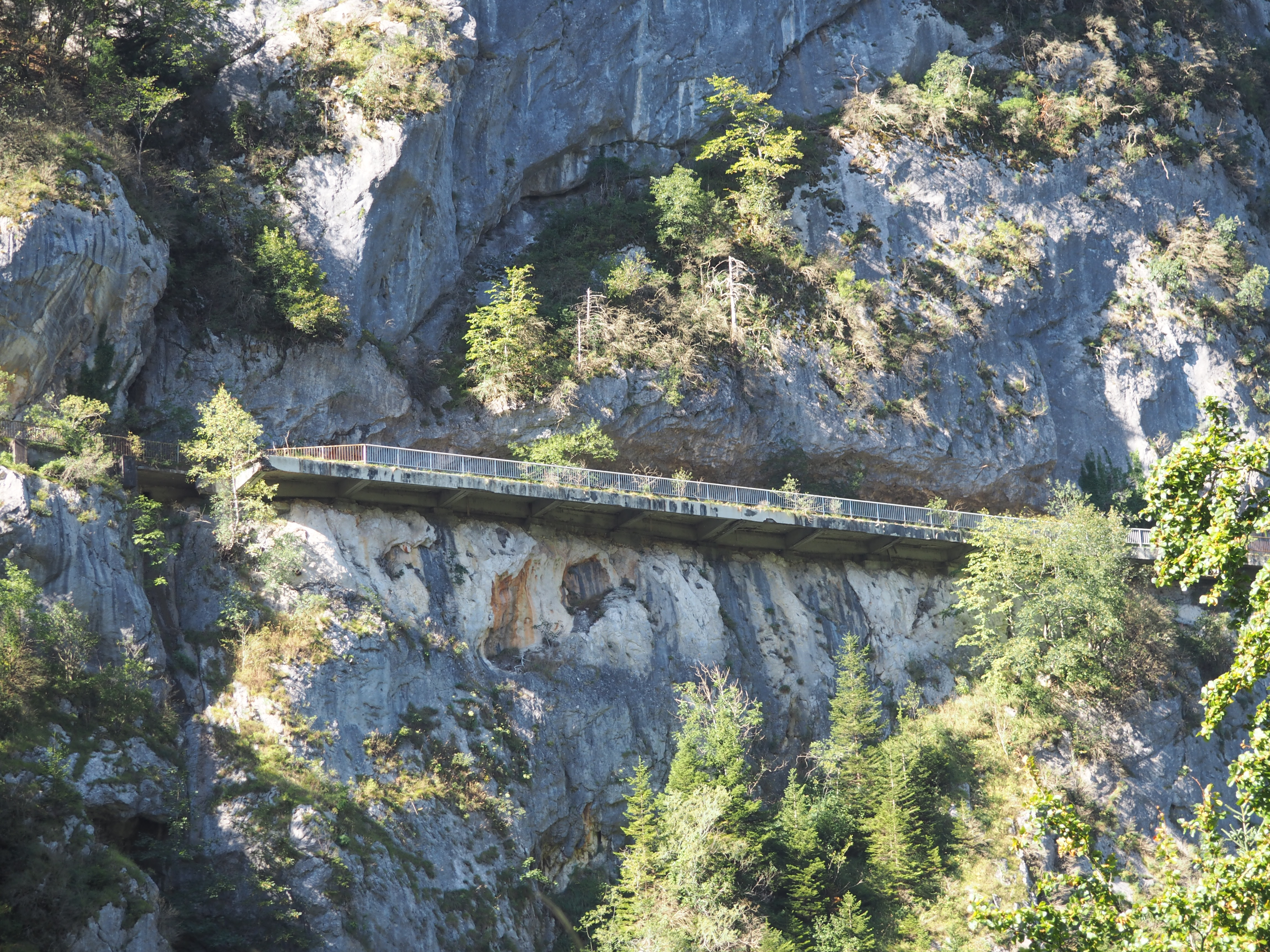 Photographie de l'ancienne route abandonnée dans les gorges du Frou (massif de la Chartreuse ; Saint Pierre d'Entremont en Isère)